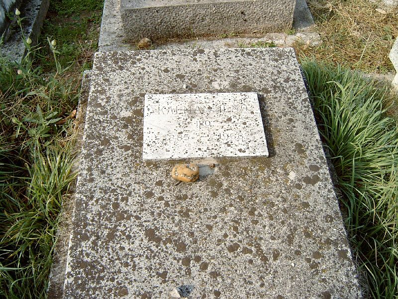 Kálmán Jenő (Szakcs, 1885. december 27. – Budapest, 1968. április 12.) újságíró, humorista sírja Budapesten. Kozma utcai izraelita temető: 5B